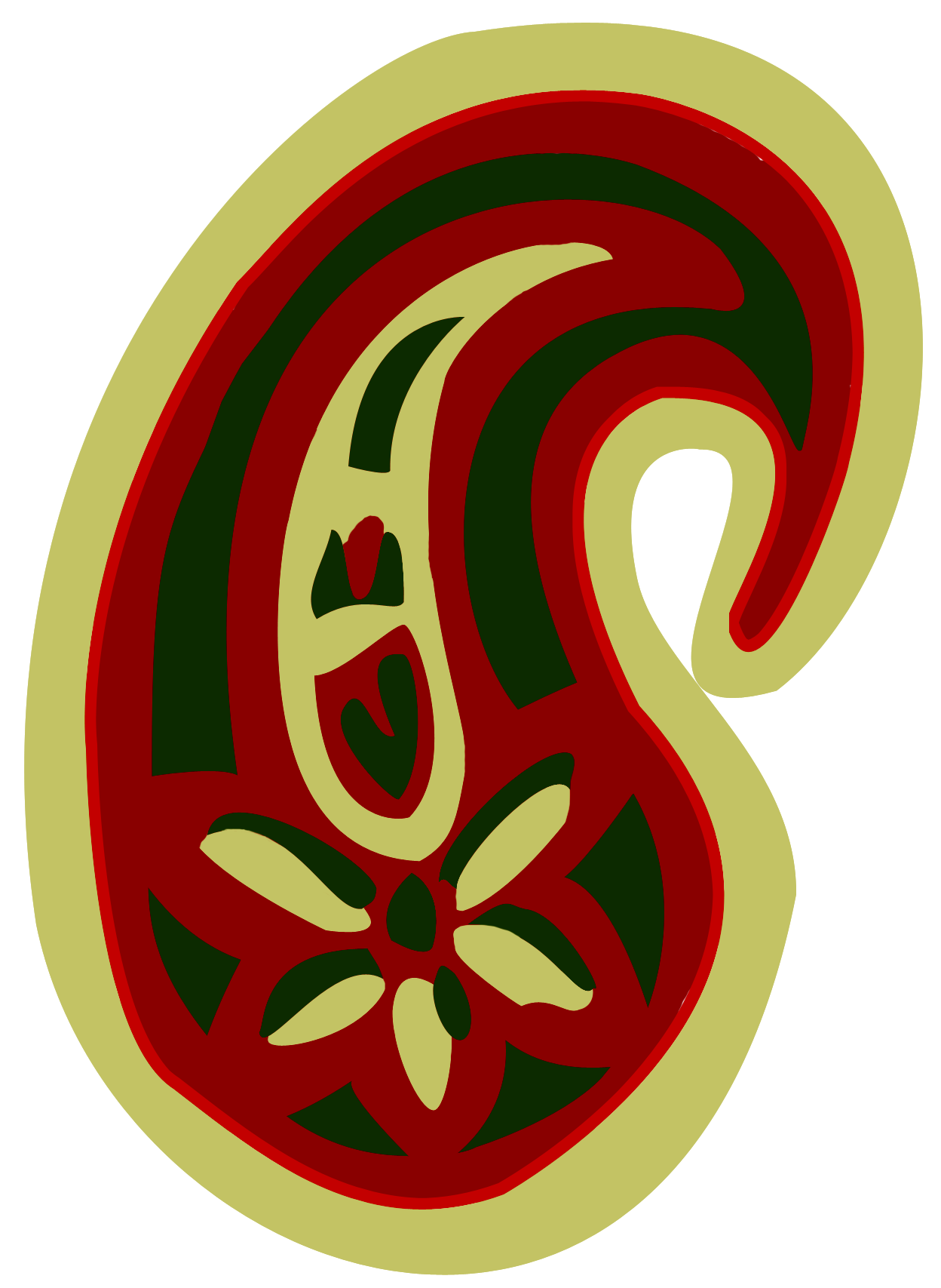 Boteh